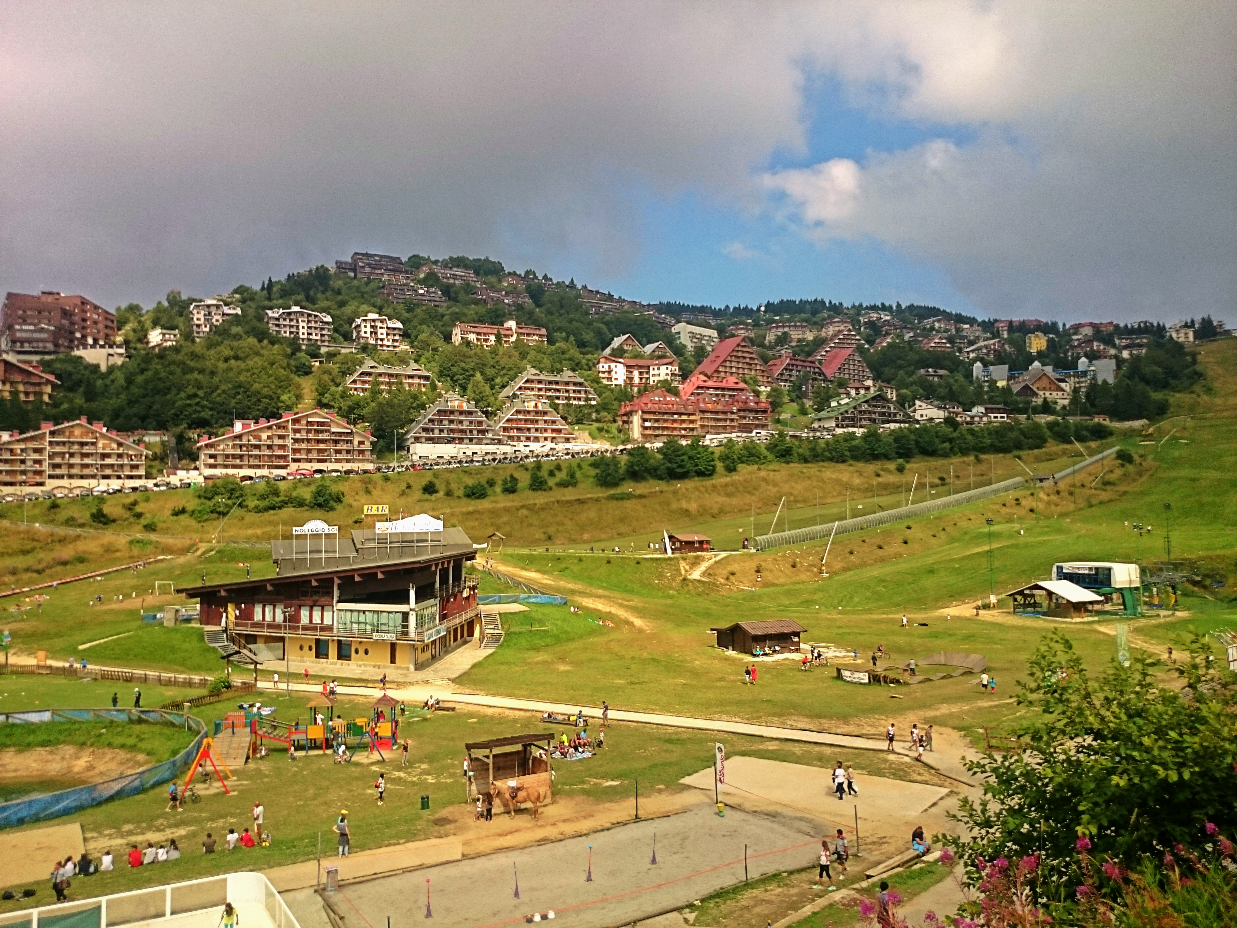 La conca di Prato Nevoso nel mese di Agosto